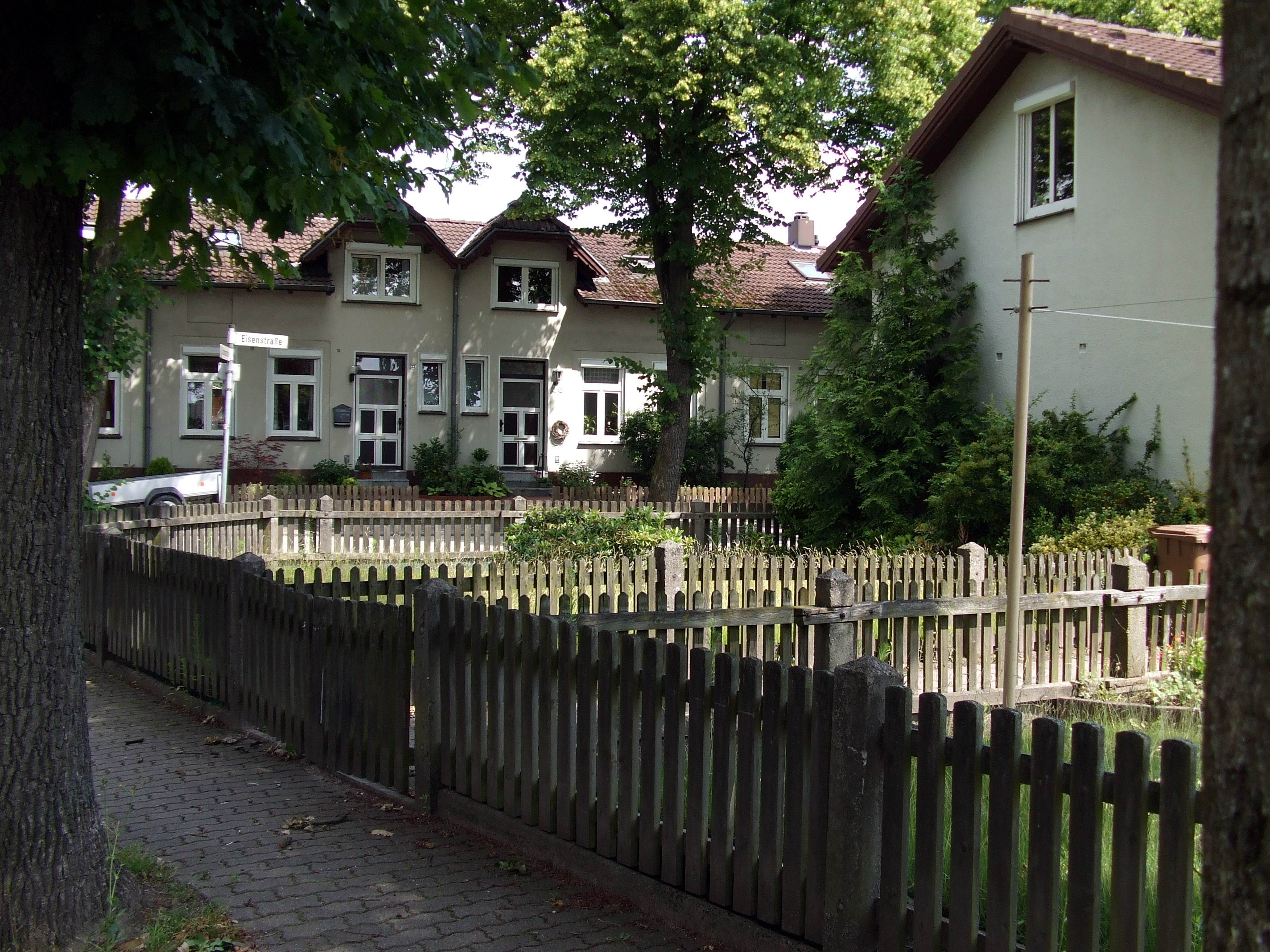 Herrenwyk: Häuser und Vorgärten der ehemaligen Arbeitersiedlung.